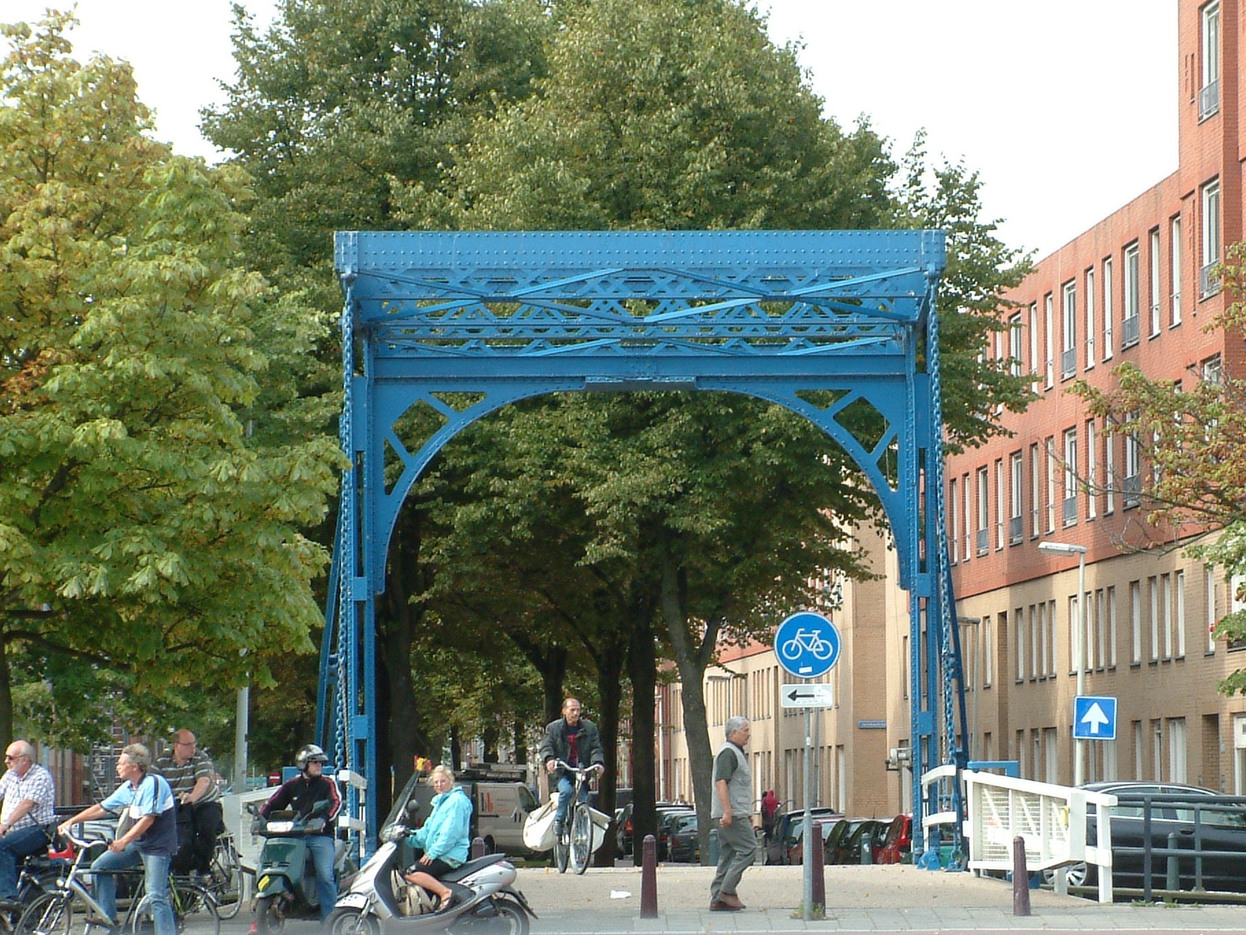 Brug in Den Haag